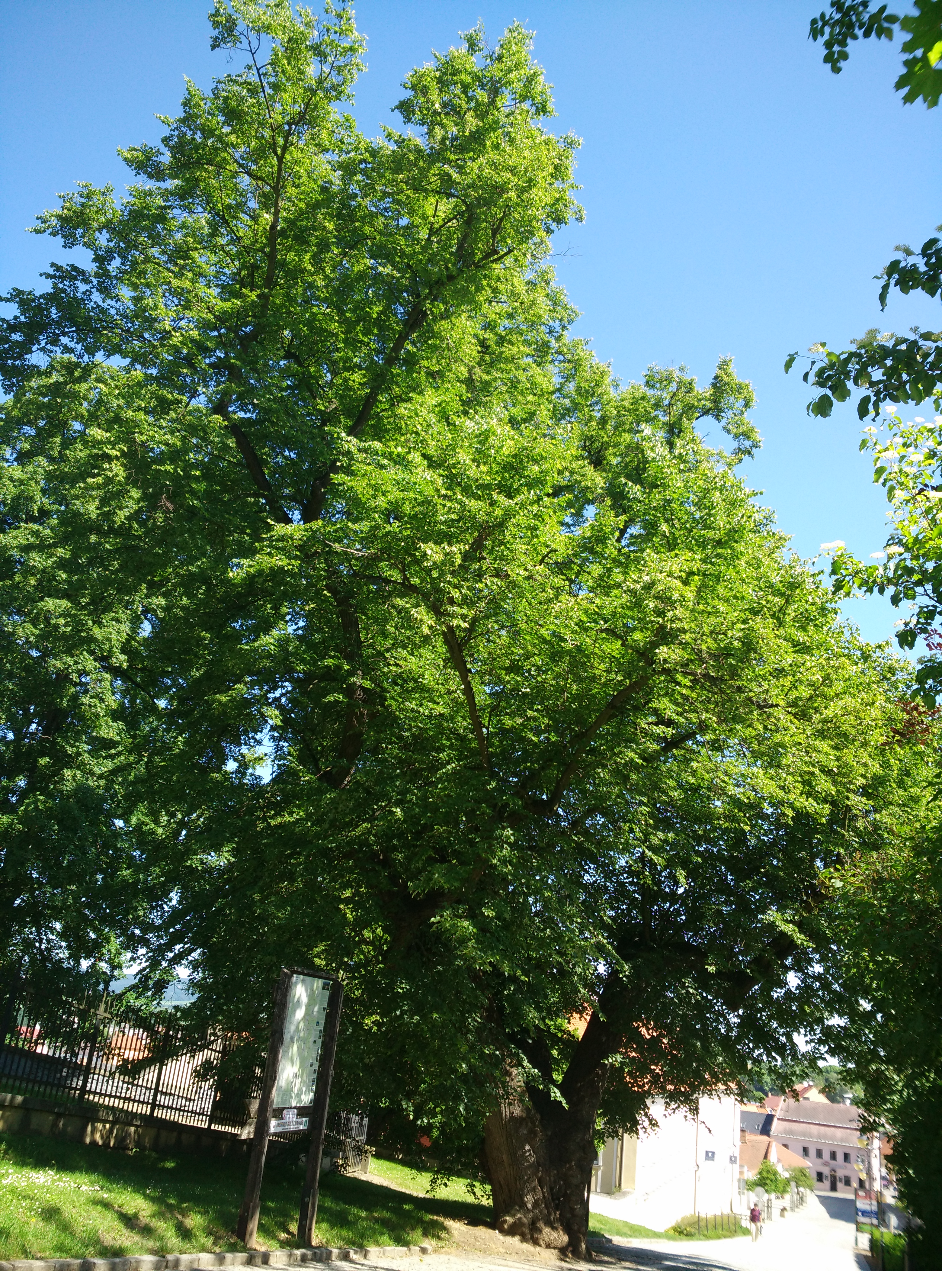 Žižkova lípa v Boskovicích (také známa jako Zámecká lípa)